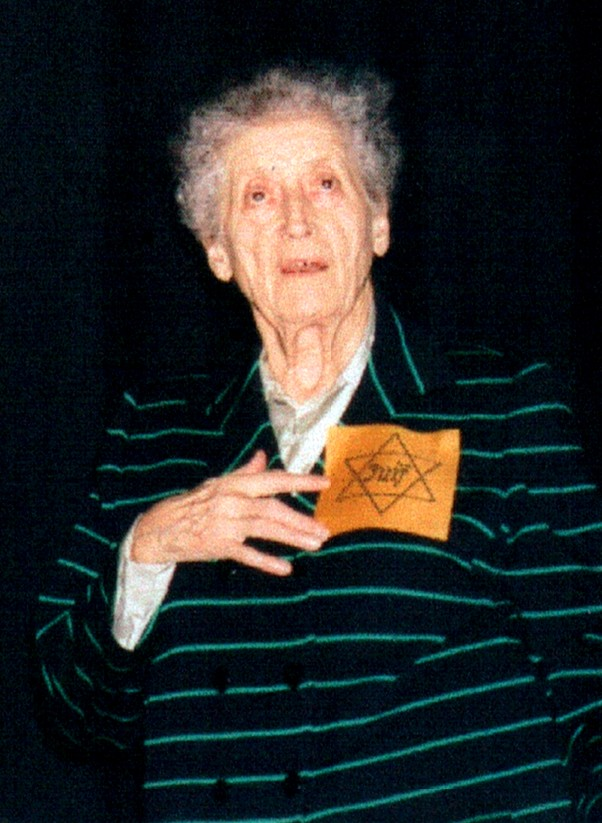 Lucie Aubrac lors d'une conférence au lycée François Villon de Beaugency en 2001.